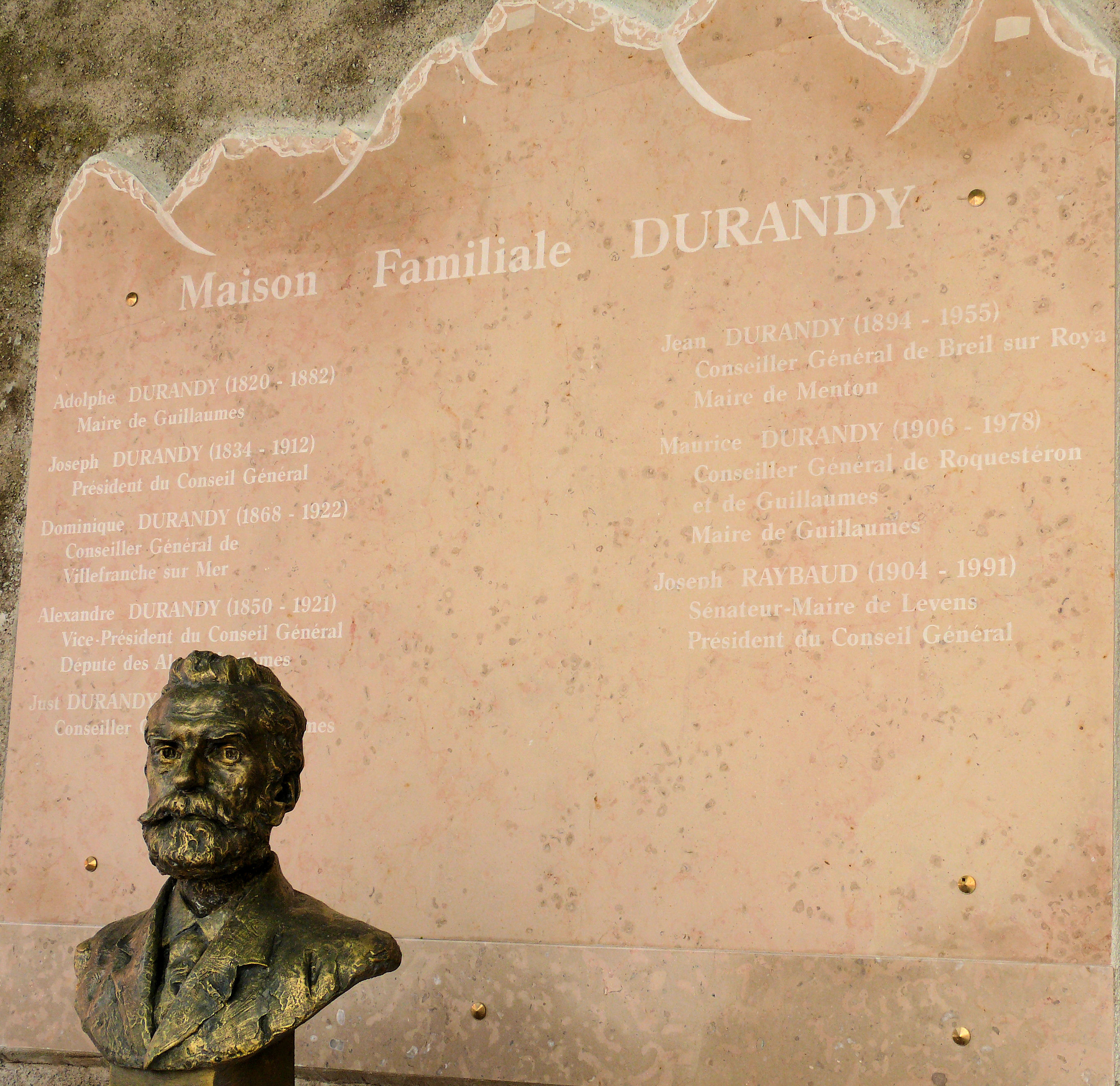 Guillaumes - Maison de la famille Durandy - Plaque commémorative et buste de Joseph Durandy par Michel de Tarnowsky (1870-1946)